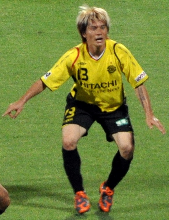 Kashiwa 0 - 3 Tokyo (Goals: Ishikawa, Cabore, Hirayama)